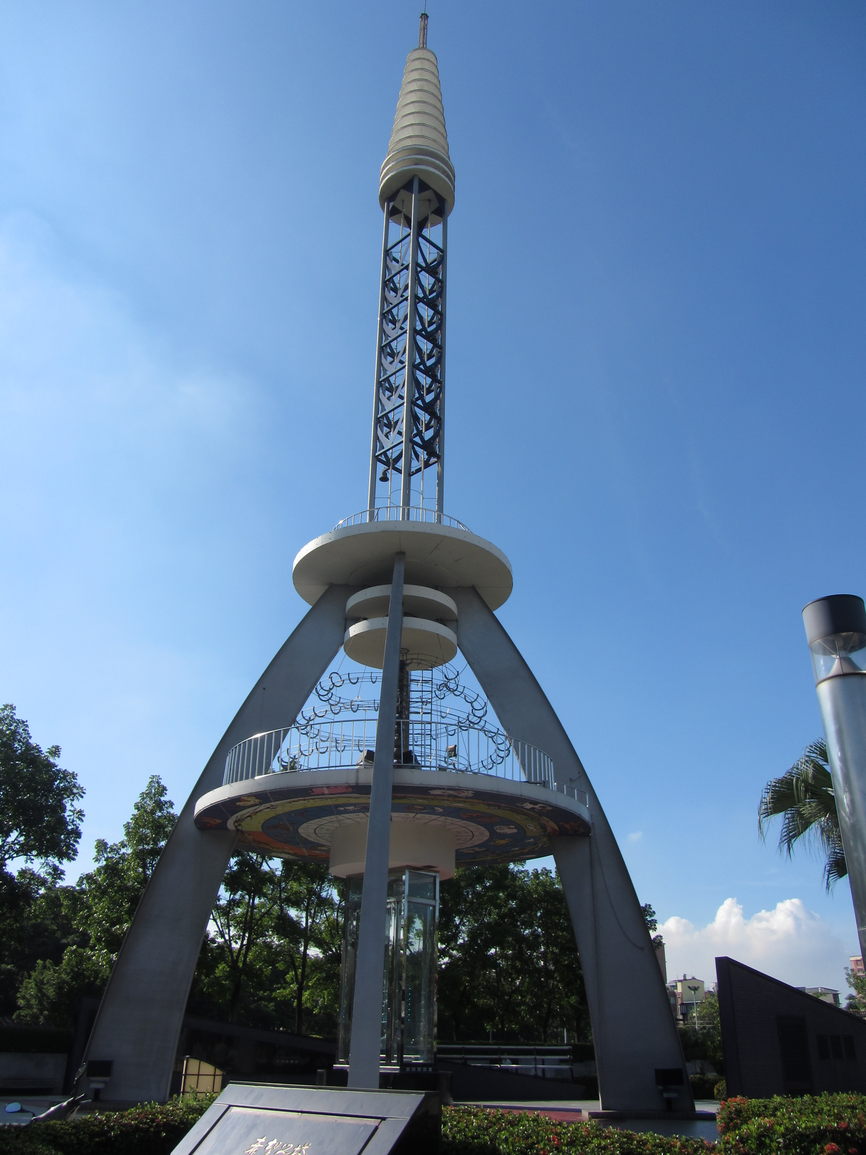 國立科學工藝博物館希望之塔